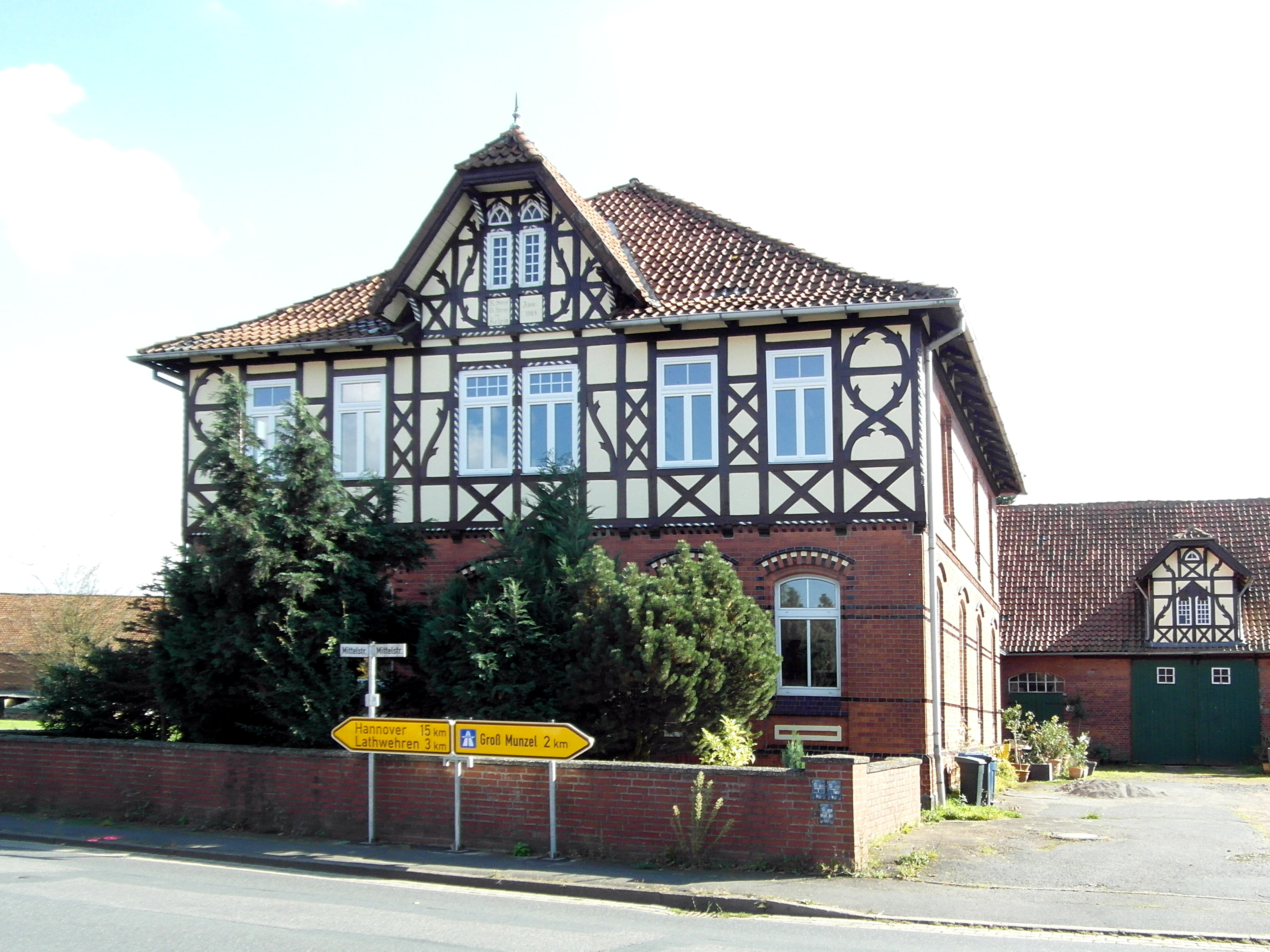 Hofanlage Mittelstrasse 26 in Ostermunzel. Die Fassade und das Treppenhaus des Wohnhauses sowie das Gesamtensemble stehen unter Denkmalschutz.